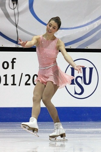 Алисса Чизни финале Гран-при по фигурному катанию сезона 2011-2012